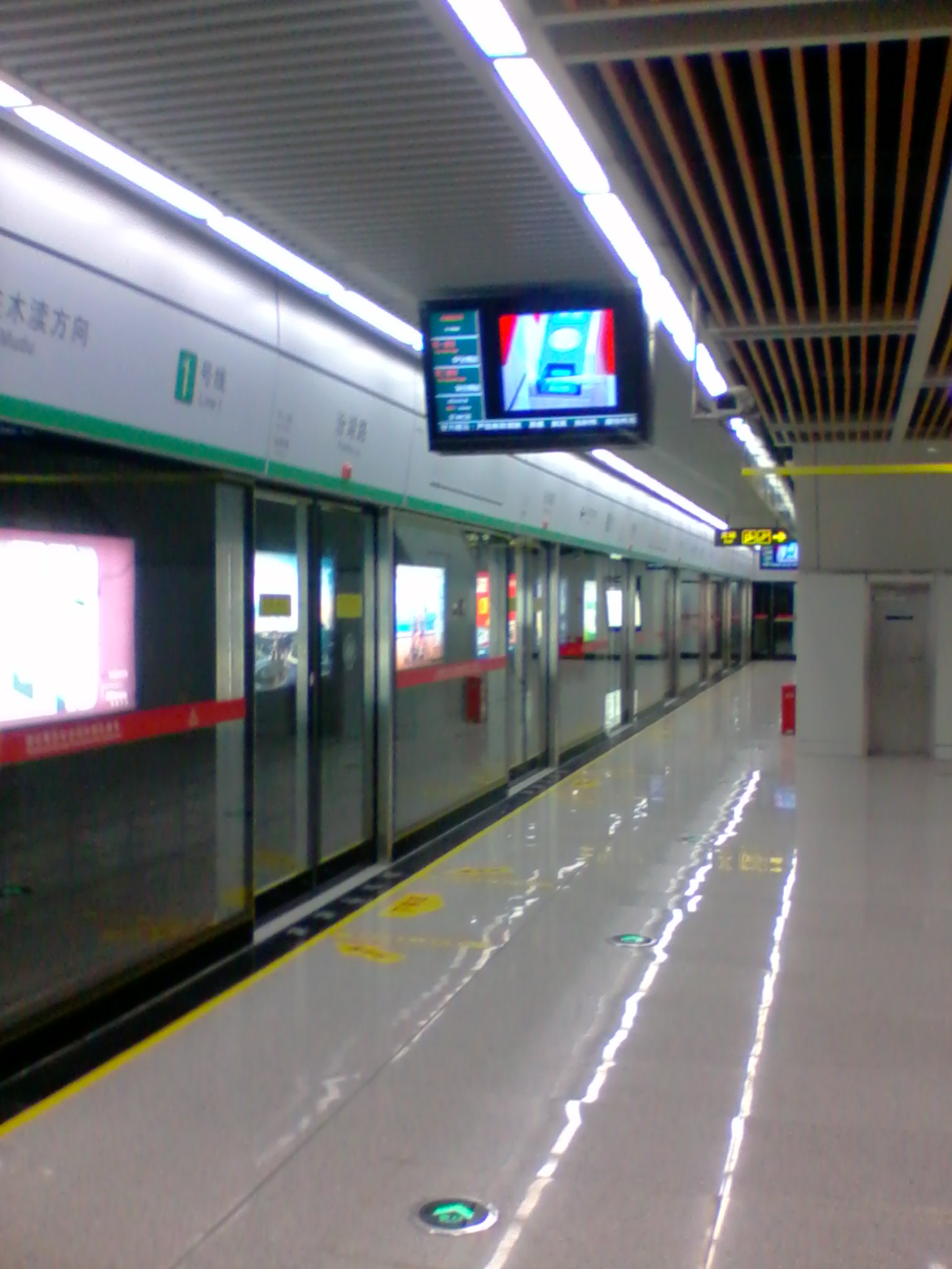 苏州地铁站内部，Huhaoyu321摄影于2012年4月28日